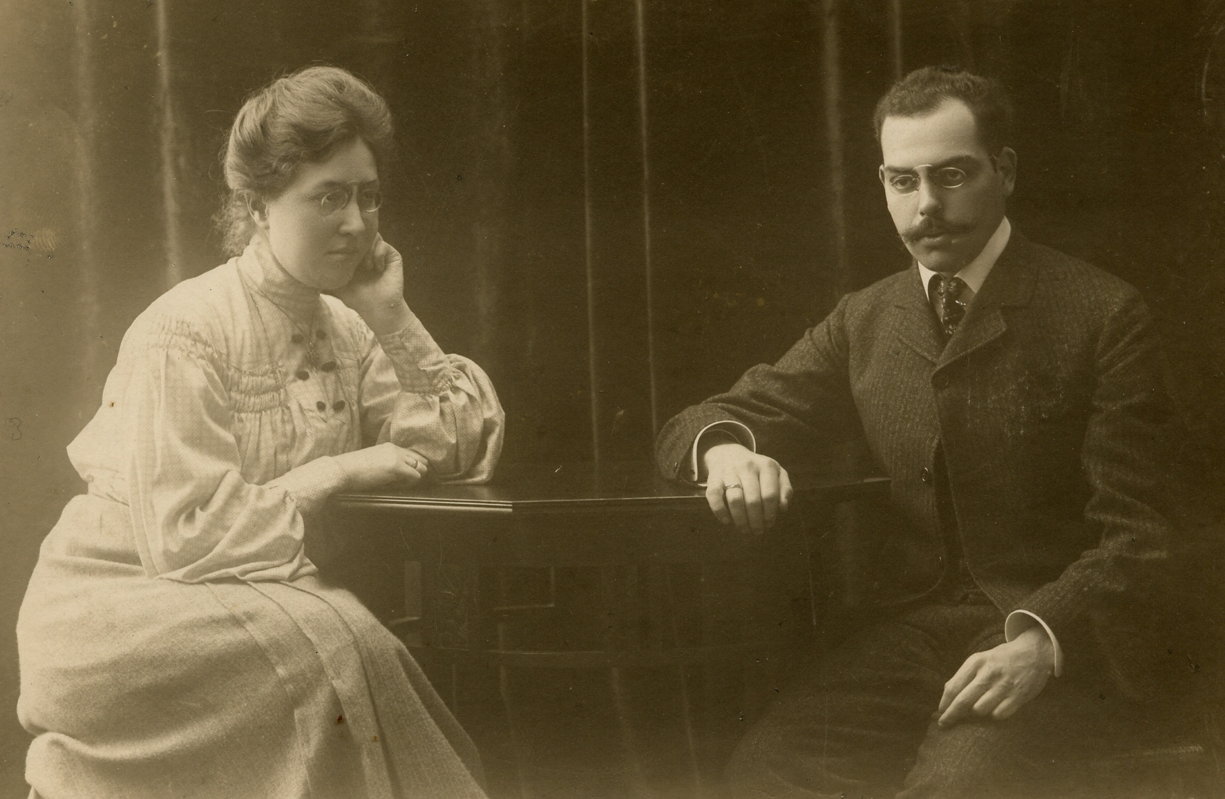 Hochzeitsbild von Rudolf und Margarete Hilferding, aufgenommen 1904